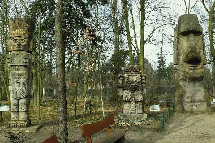 Muzeum A. Fiedlera w Puszczykowie (okolice Poznania).